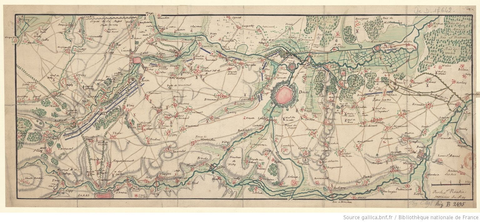 carte réalisée par Naudin.